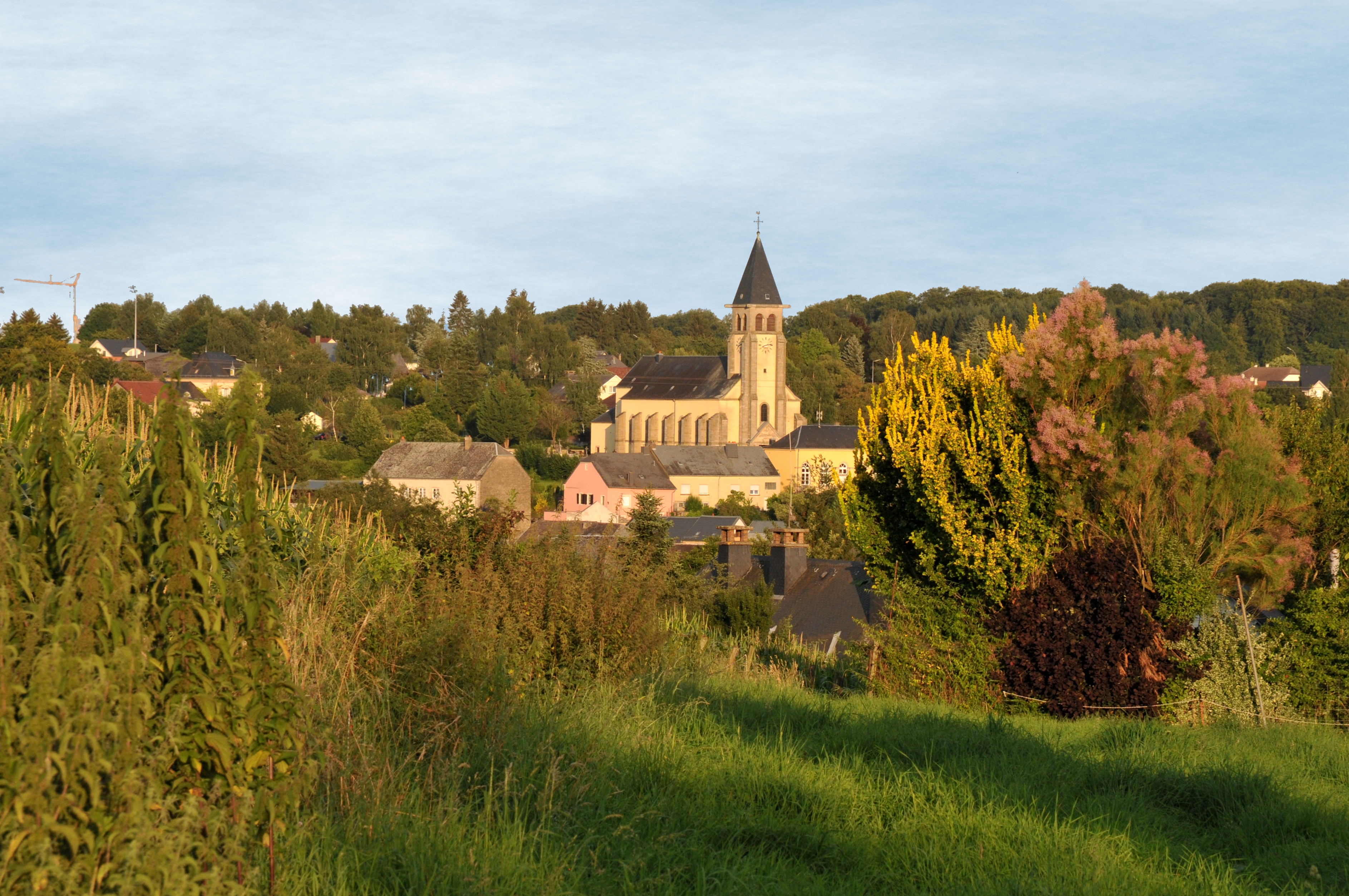 Vue op Duelem (Réimech).